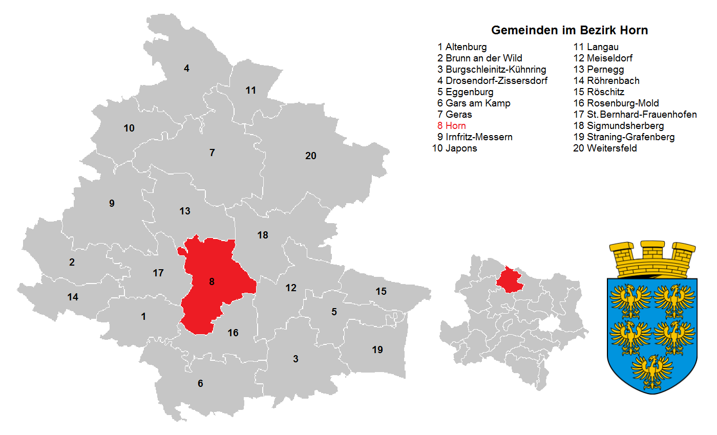 Bezirk Horn